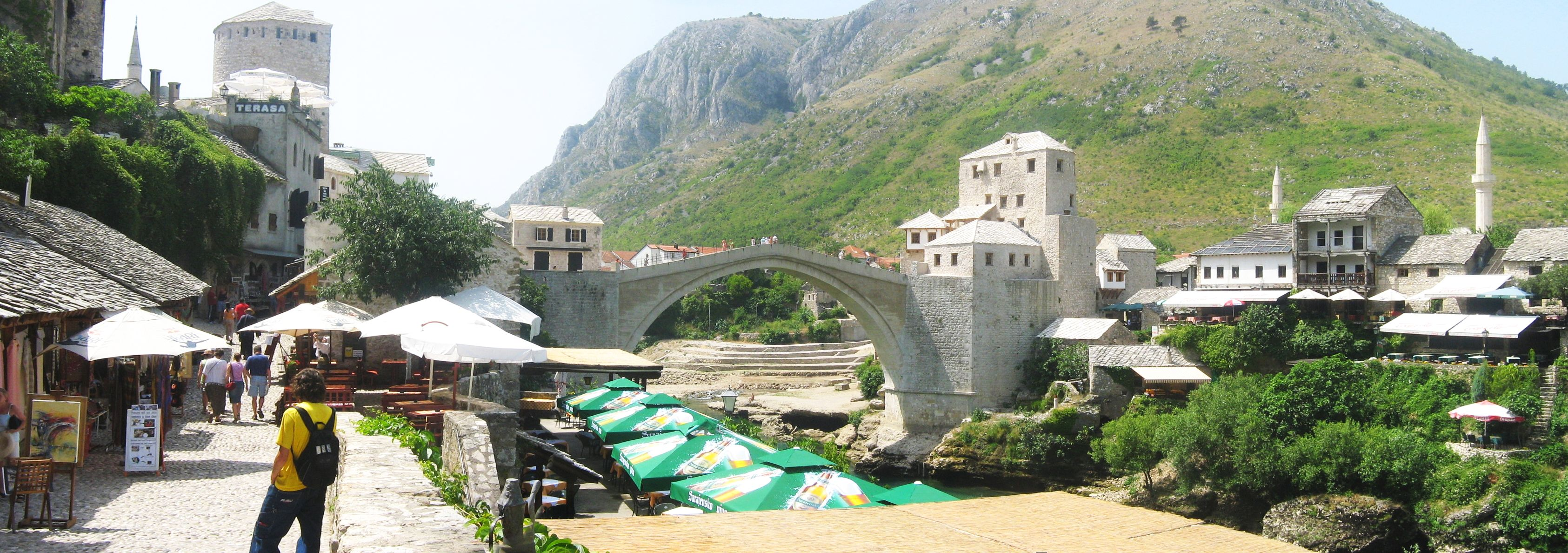 Stari Most u Mostaru